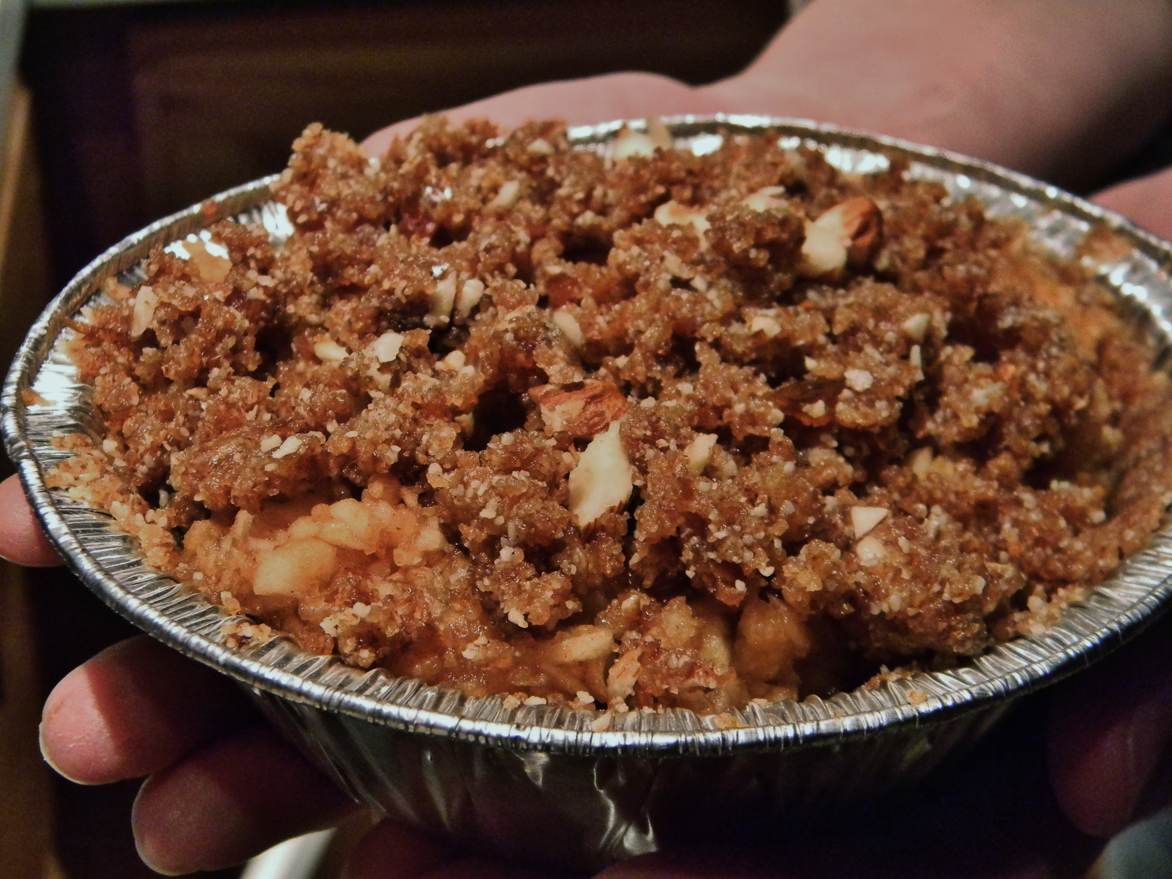 Raw Vegan Apple Pie